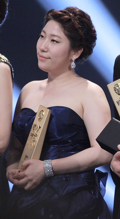 2014 백상예술대상.